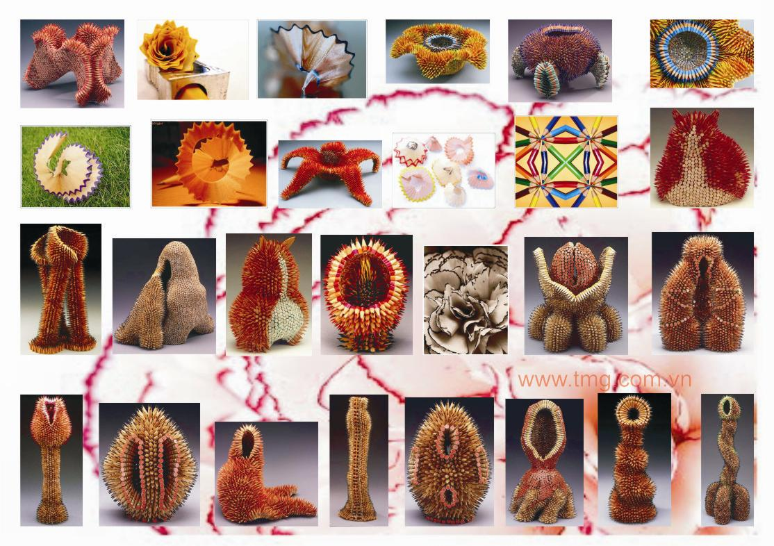 Arts from pencil